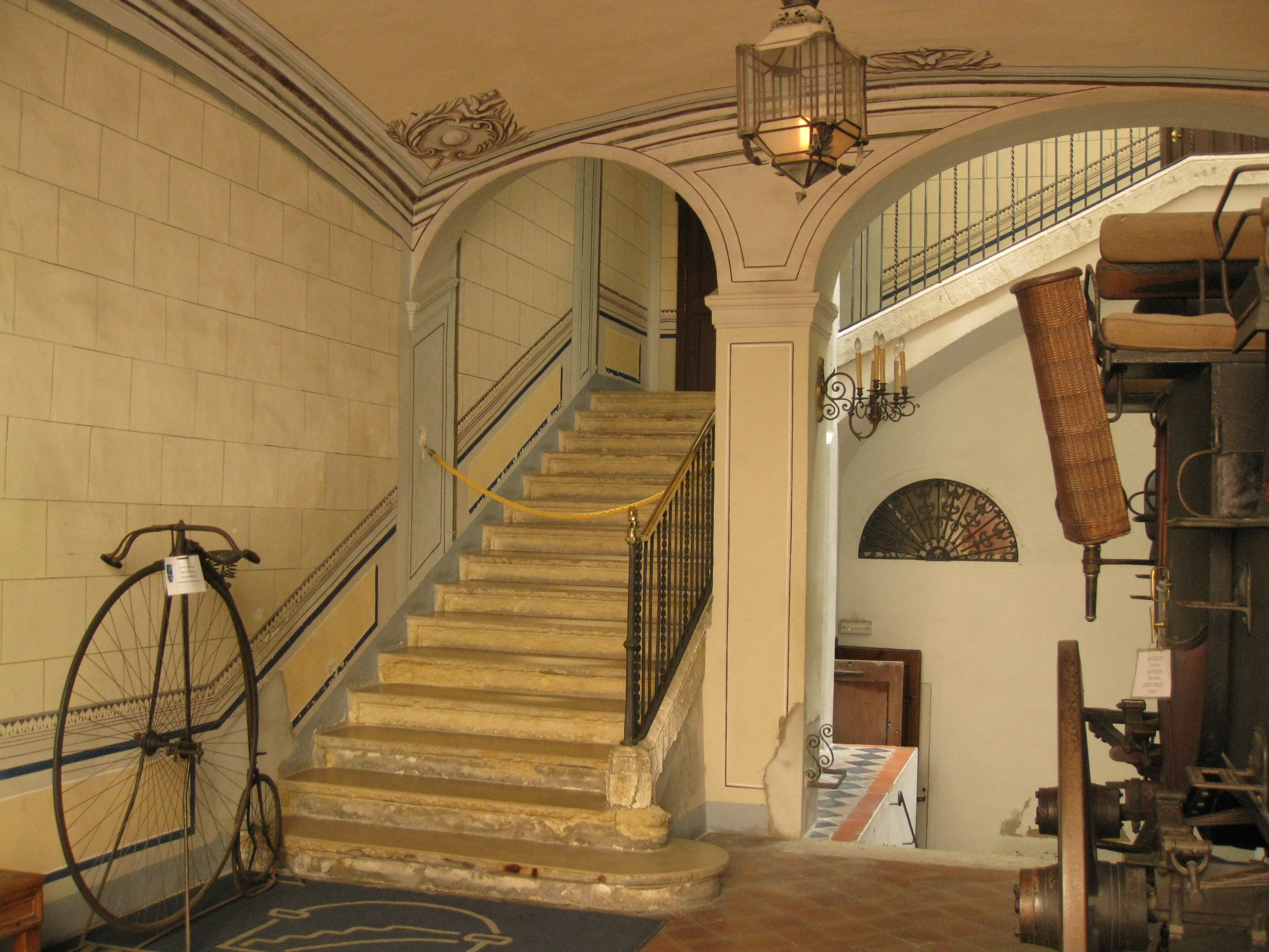 Museu Romàntic Can Llopis (Sitges)